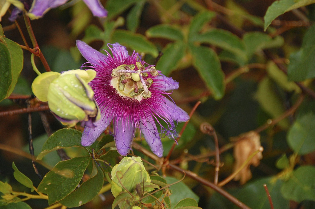 Primeiro resultado do tour fotogr�fico de hoje no Parque da Cidade, com /jonatasoliveira e /aninha_daguiar. Aninha que gritou: "Olha! Uma flor de maracuj�!" Eu e Oliveira: ... Aninha: "Voc�s est�o a� parados porque n�o conhecem a flor do maracuj�!" Realmente, Aninha. :)